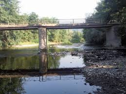 Podul peste Cris